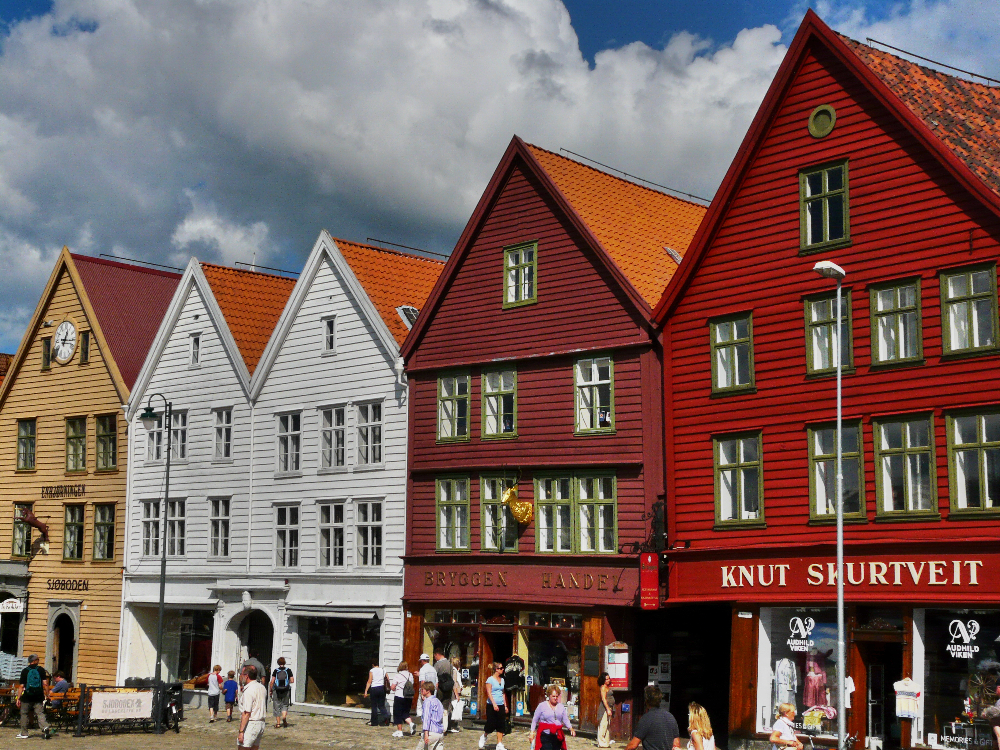 Bryggen in Bergen